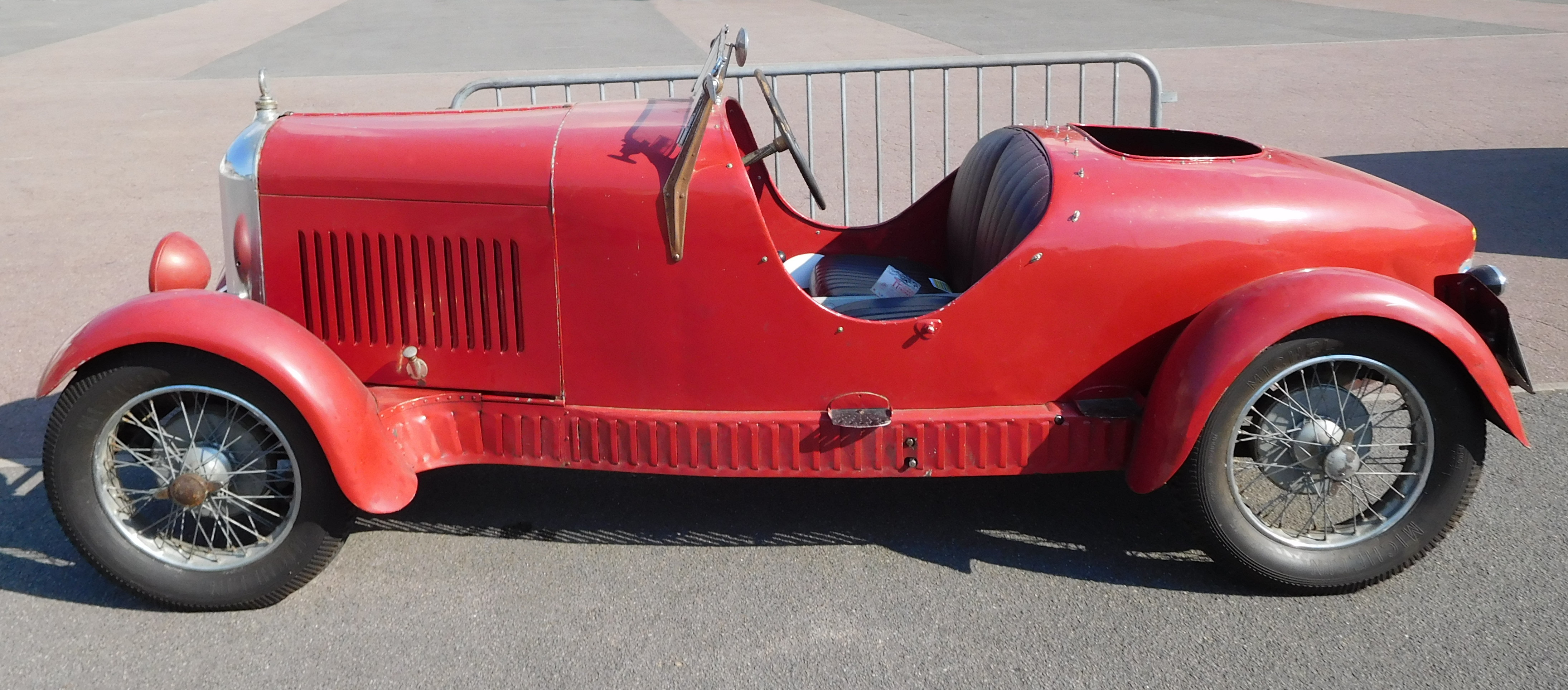 Amilcar type G de 1927, Briare, Loiret, France.